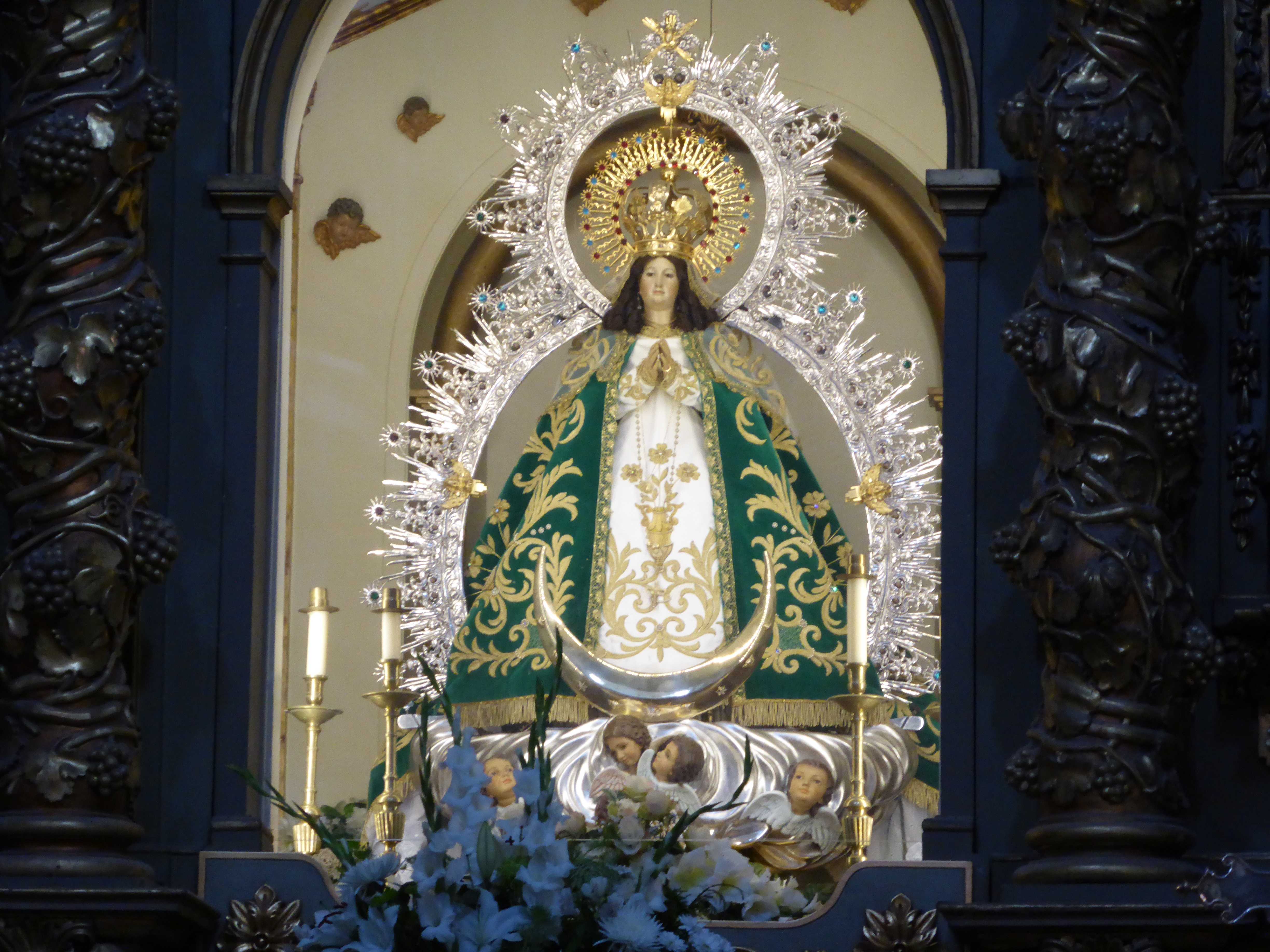 Imagen religiosa de "Nuestra Señora de los Ángeles" (Getafe, provincia de Madrid). Fotografía tomada en el interior de la ermita de Nuestra Señora de los Ángeles, situada en el Cerro de los Ángeles.